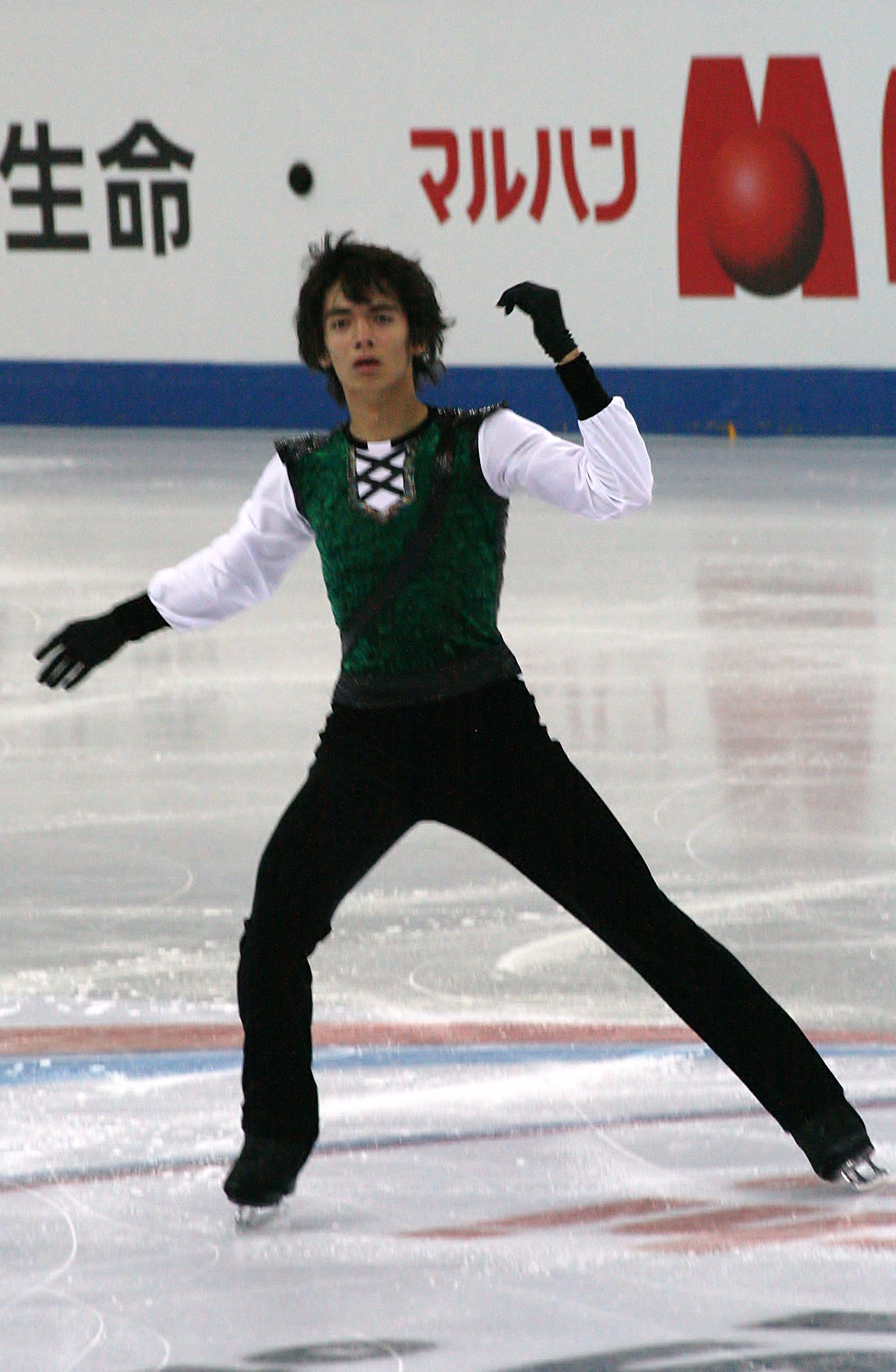 Руджи Хино (Япония) на финале Гран-при среди юниоров 2012-2013. Произвольная программа.